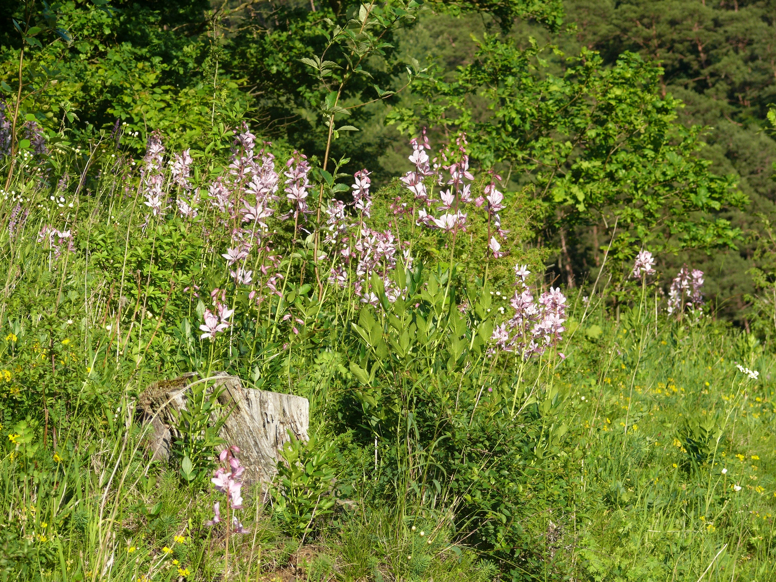 Dictamnus albus, Tauberland, Deutschland